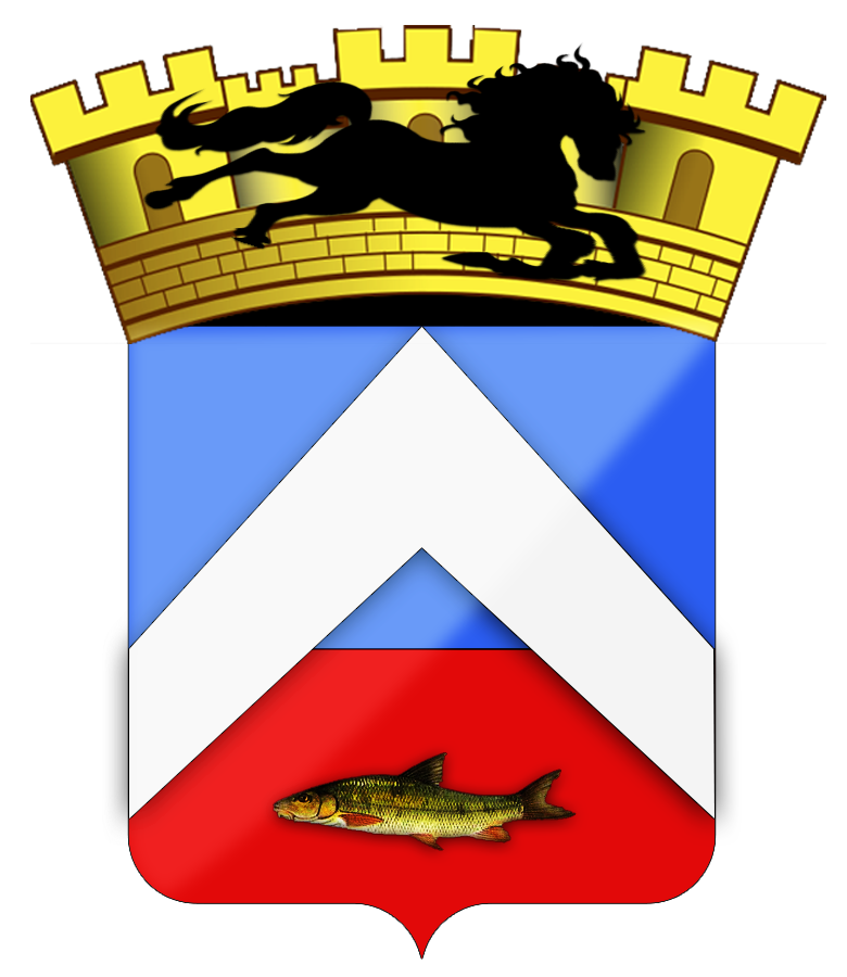 L'Azur représente le ciel d'Algérie, les gueules (d'un mot persan signifiant les couleurs) symboliseraient le désert ; ou, selon une autre signification, les gorges du Rhumel (décrites par Guy de Maupassant telles q'un "Abîme rouge comme si les flammes éternelles l'avaient brûlé"). Le chevron représente le confluent en amont et près de Constantine des Oueds Rhumel et Bou Merzoug. Certains croient y voir l'éperon des cavaliers arabes. Le barbeau est l'évocation du Rhumel qui traverse la ville ; poisson commun des oueds algériens, (il ne faut pas y voir la marque des premiers chrétiens). La couronne murale est le timbre normal des blasons des cités. Ici, elle a une signification particulière. Constantine (ex. Cirta) était dès la plus haute antiquité, un place forte, entourée de solides fortifications. Quant au cheval, à robe noir de Numibie (gai signifiant nu c'est à dire ni sellé ni bridé), il rappelle l'importance de l'animal de selle pour les populations de la région. Il peut rappeler aussi le souvenir de la célèbre jument noire Halilifa, passée dans la légende arabe, qui par son instinct, sa vigueur et son galop, contribua à la délivrance de Constantine assiégée par les Tunisiens en 1700. R. Le Viavant... (Texte extrait du livre "De Cirta à Constantine de 1836 à 1962", "ACEP Ensemble" Éditeur)